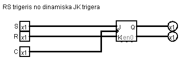 RStoD